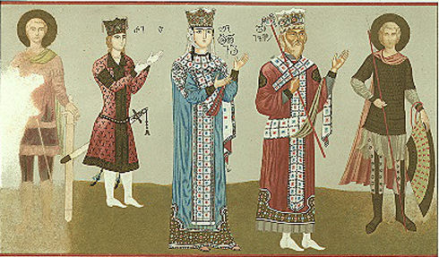 Georgie. Eglise de Bethanie, peintures murales